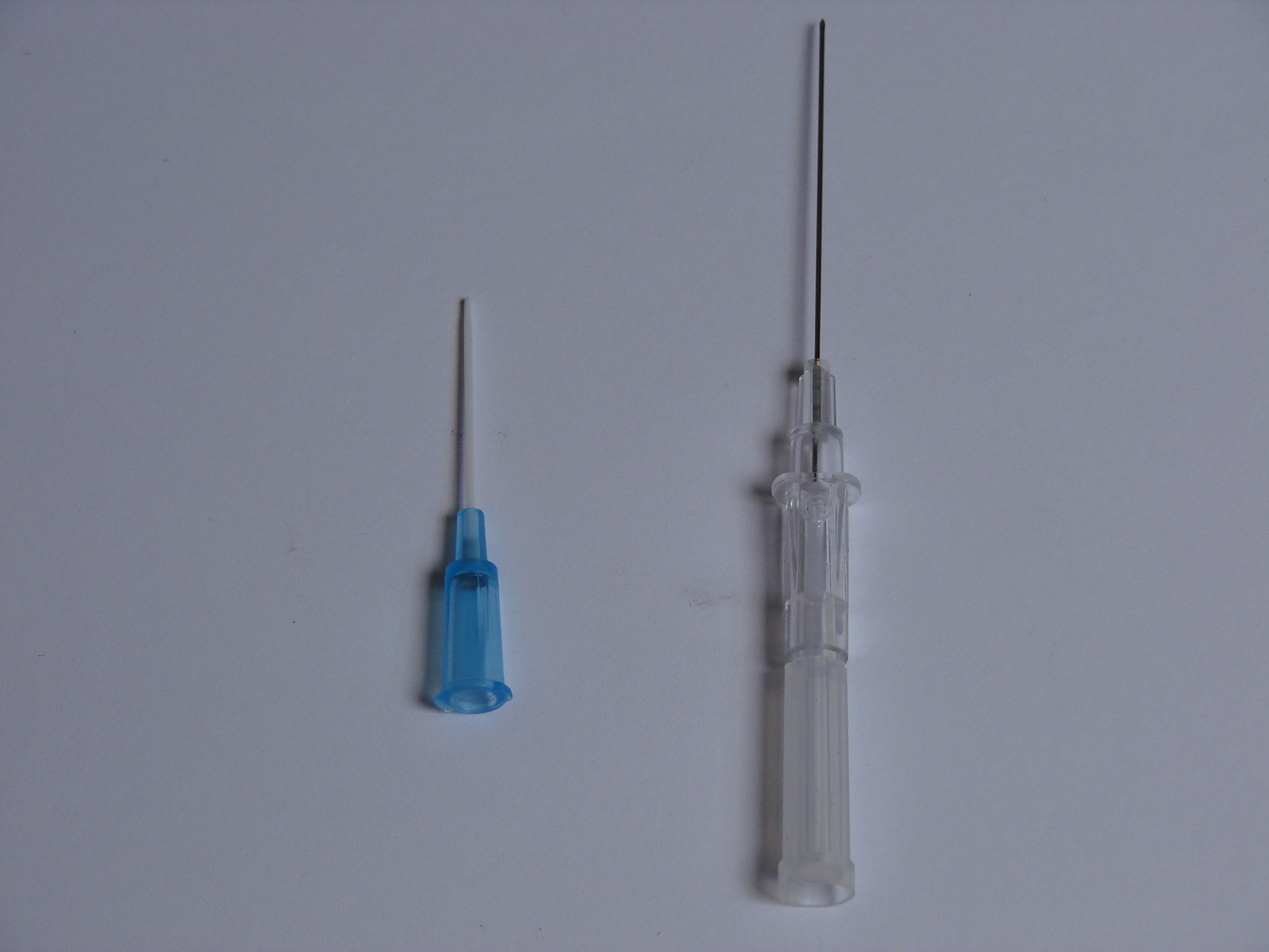 De twee onderdelen van een katheter. Links het deel van de katheter, dat in de vene verblijft, en rechts de naald, die gebruikt wordt, om doorheen de huid in de vene te steken.